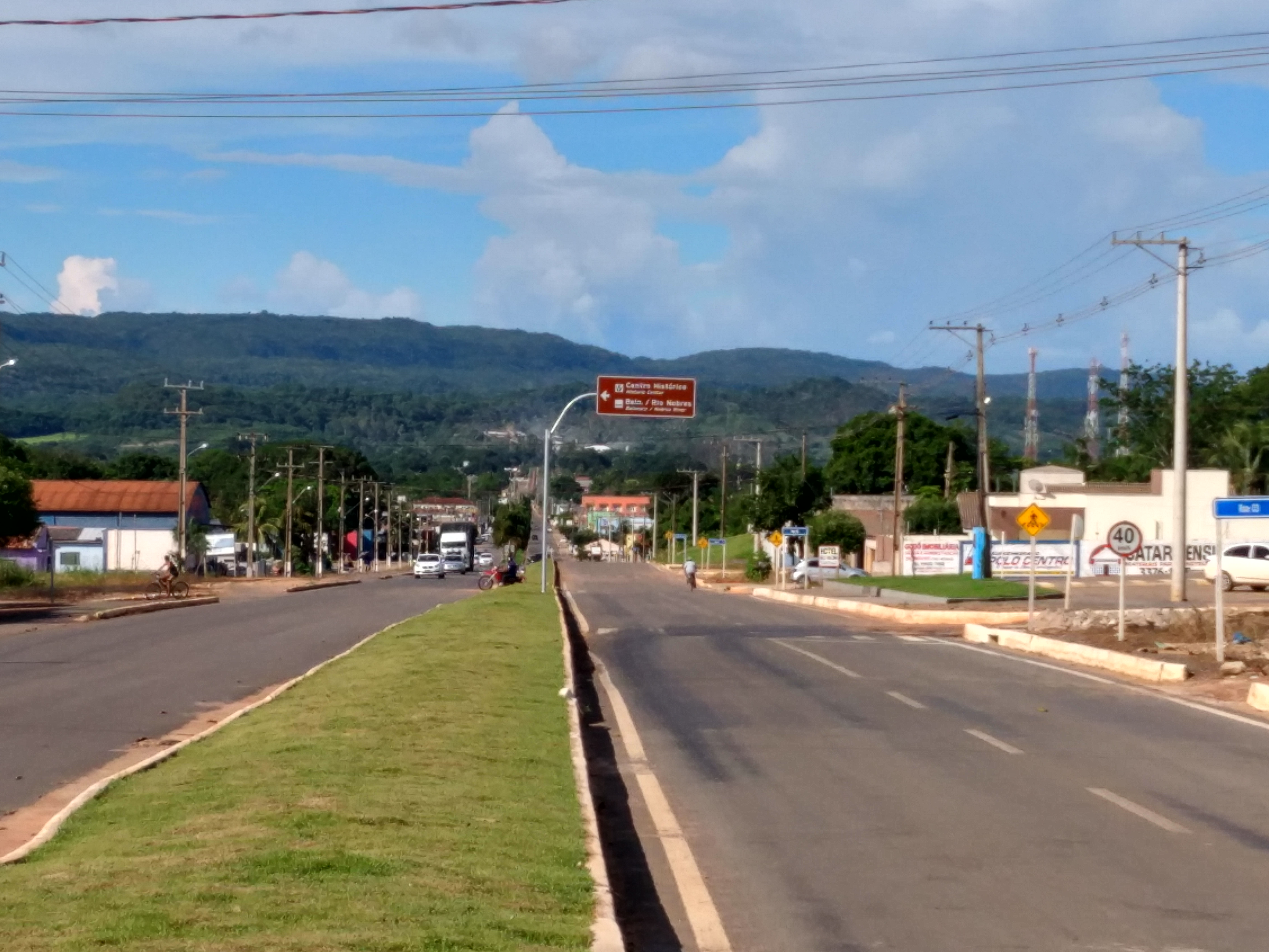 1ª Entrada da cidade de Nobres - MT